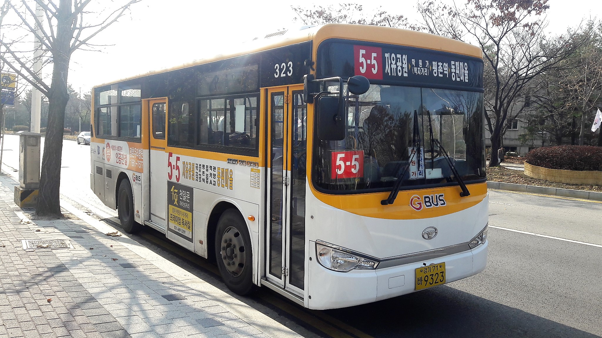 안양시 마을버스 5-5번